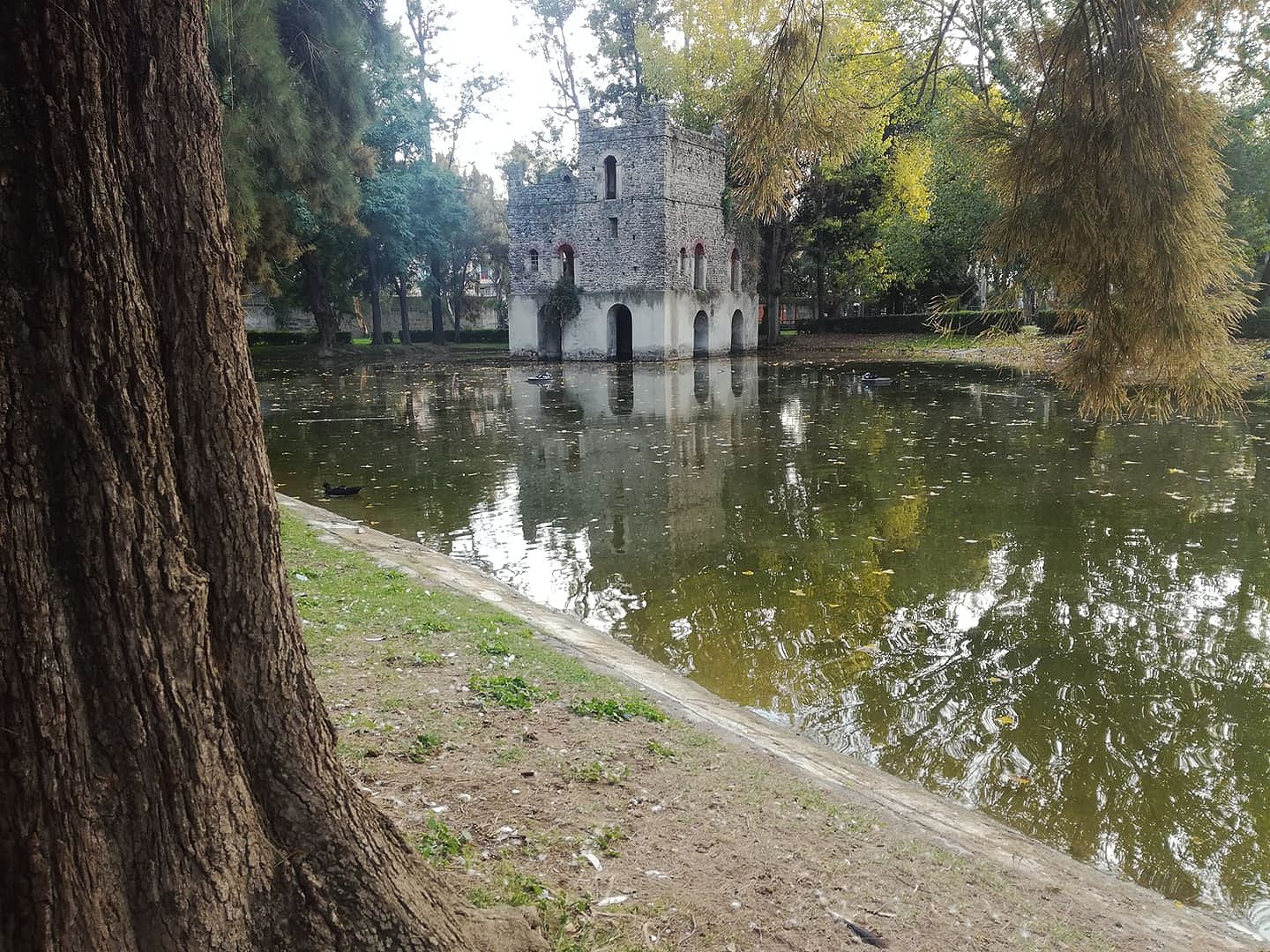 Laghetto Fasilides (Mostra d'Oltremare)